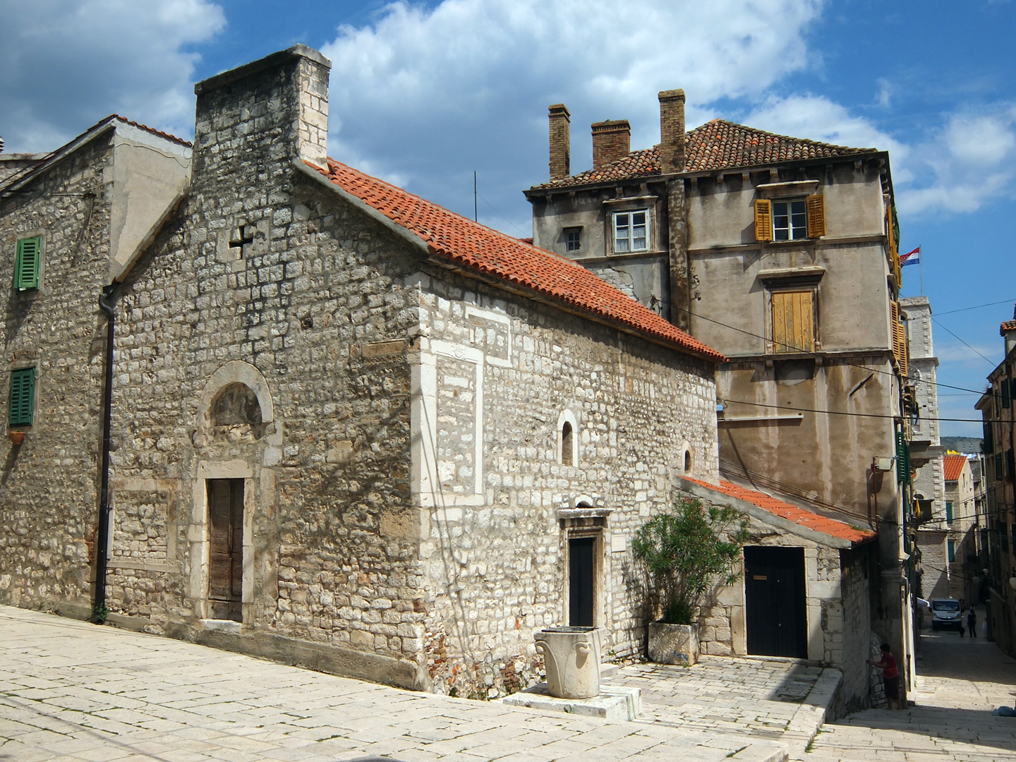 Srpskohrvatski / српскохрватски: Najstariji sakralni objekt u Šibeniku iz 12. stoljeća. Danas umjetnička galerija